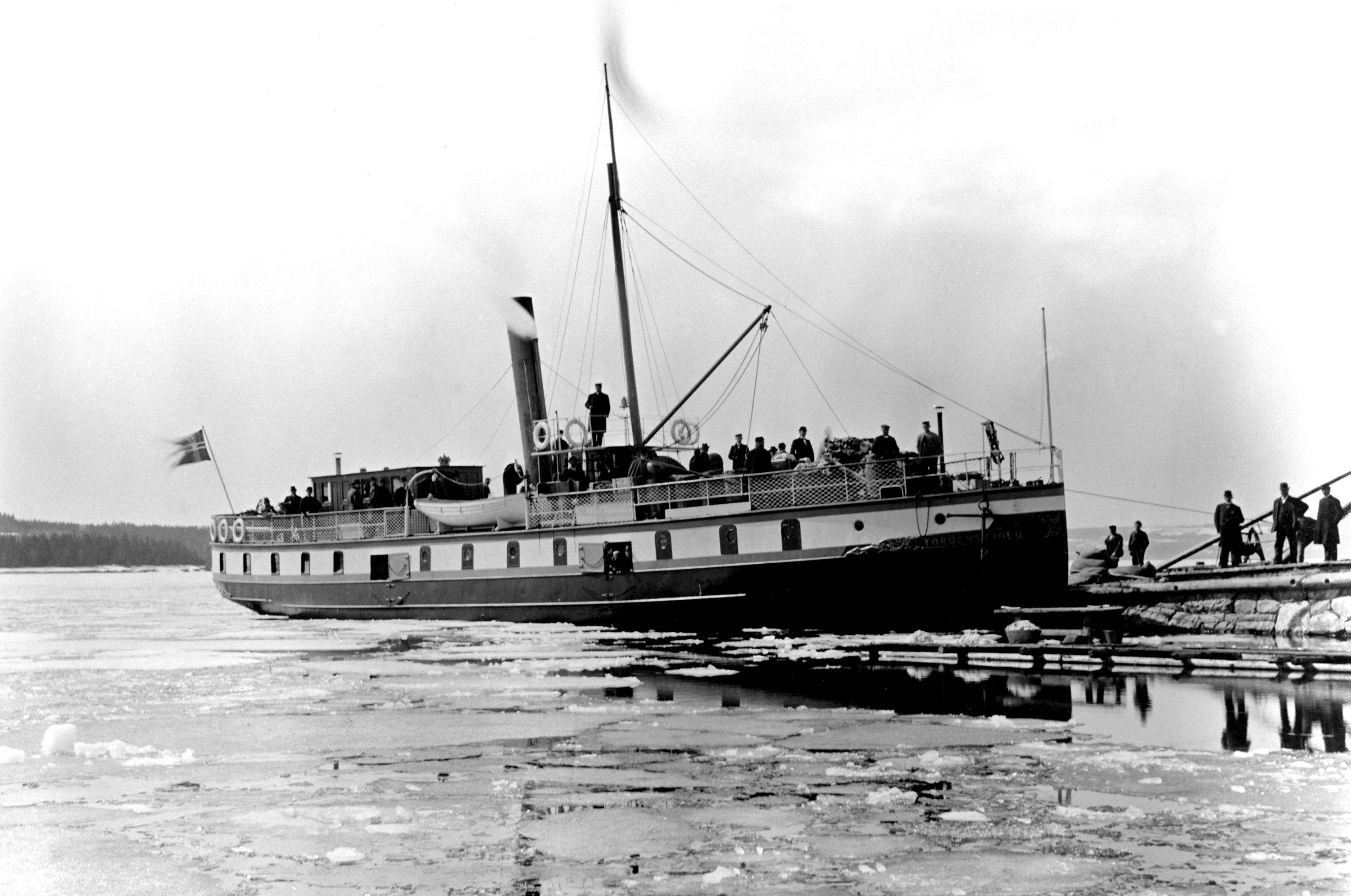 D/S "Tordenskjold" ved Nes brygge